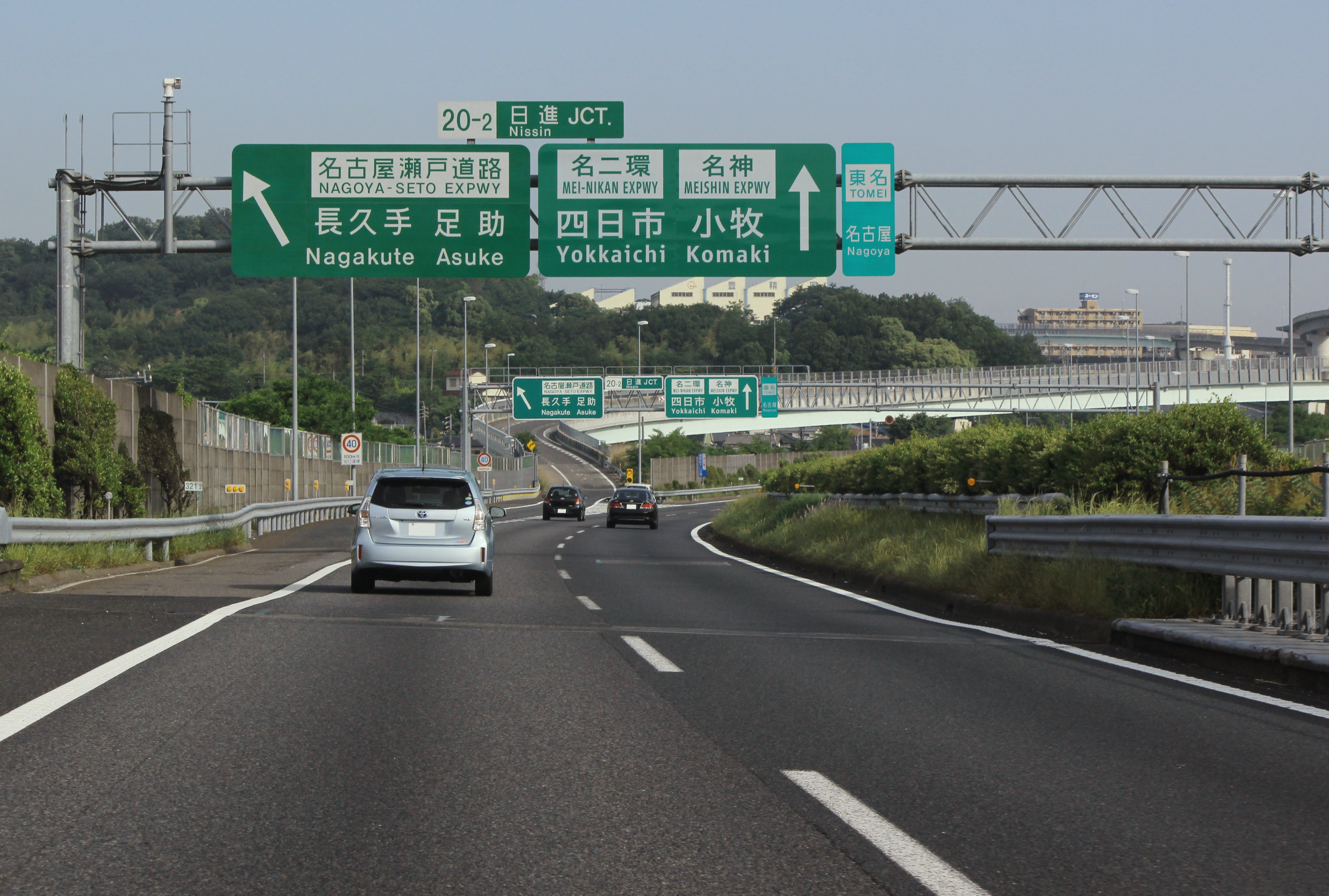 東名高速 日進ジャンクション